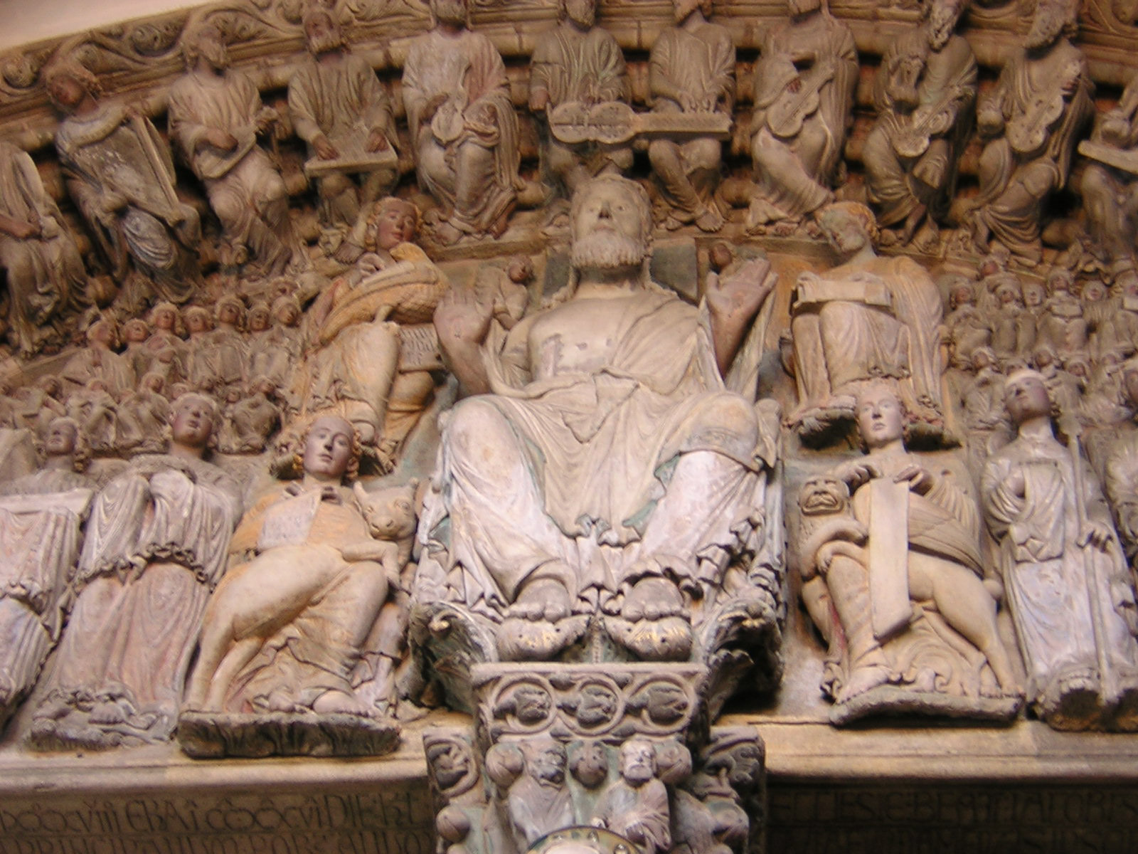 Pantocrator do Pórtico da Gloria da Catedral de Santiago de Compostela - A Coruña